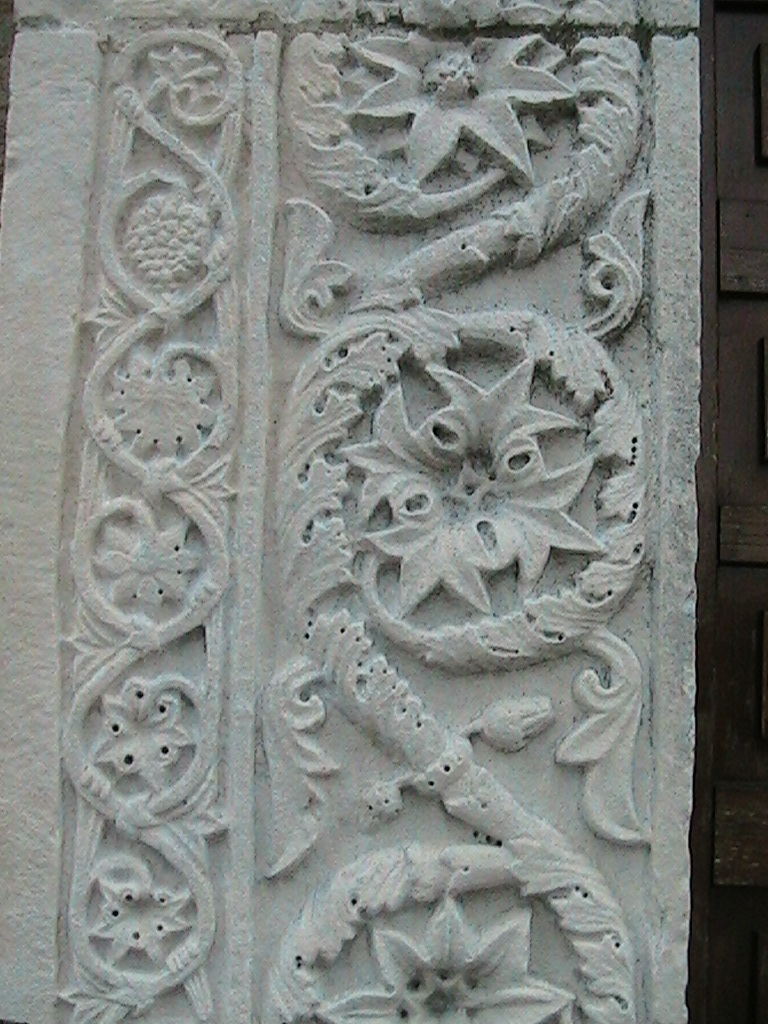 Sculture del portale